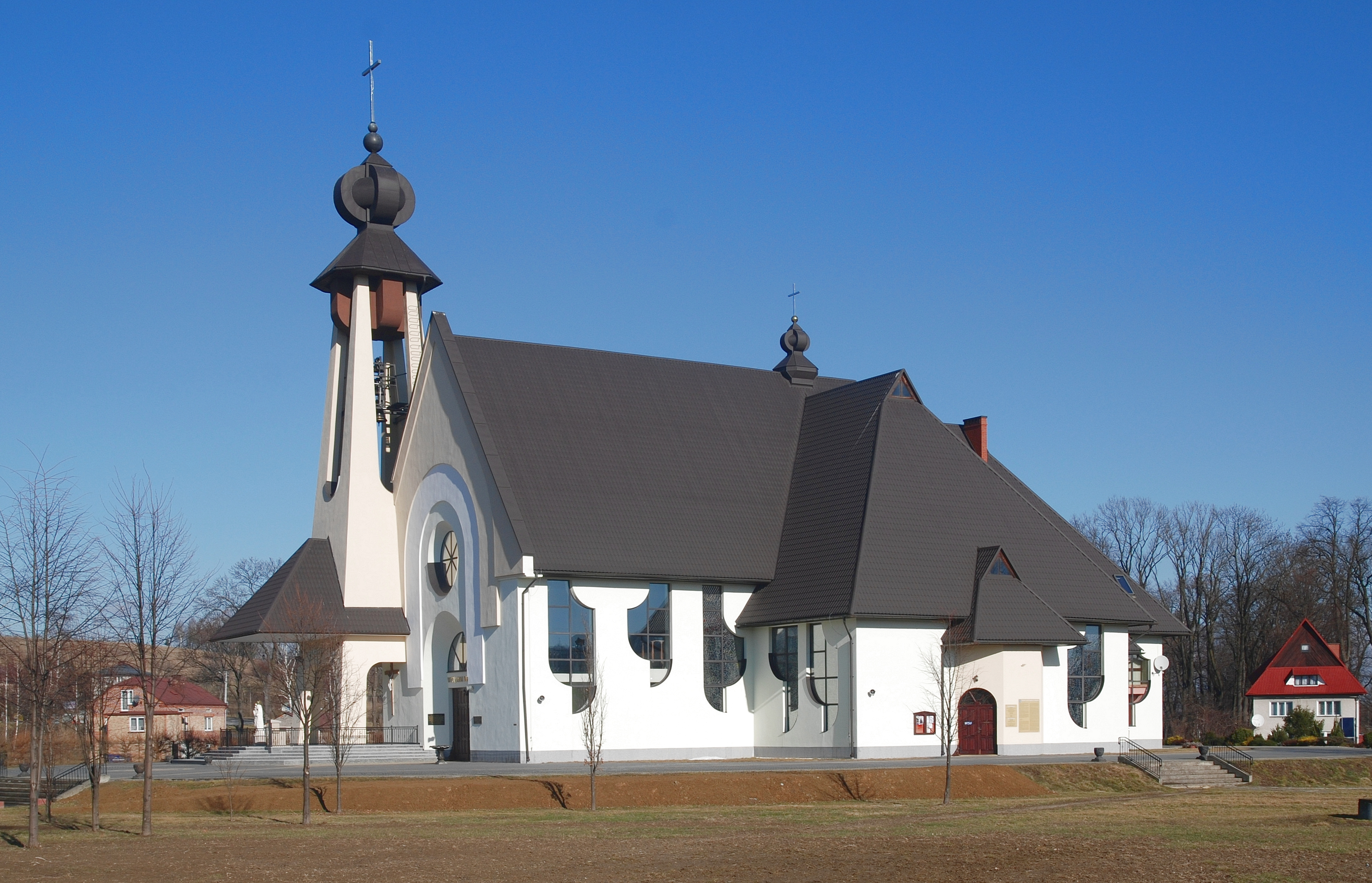 wieś Lipinki (województwo małopolskie)